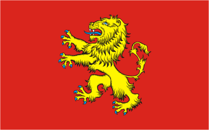 Учреждённый флаг Ржева